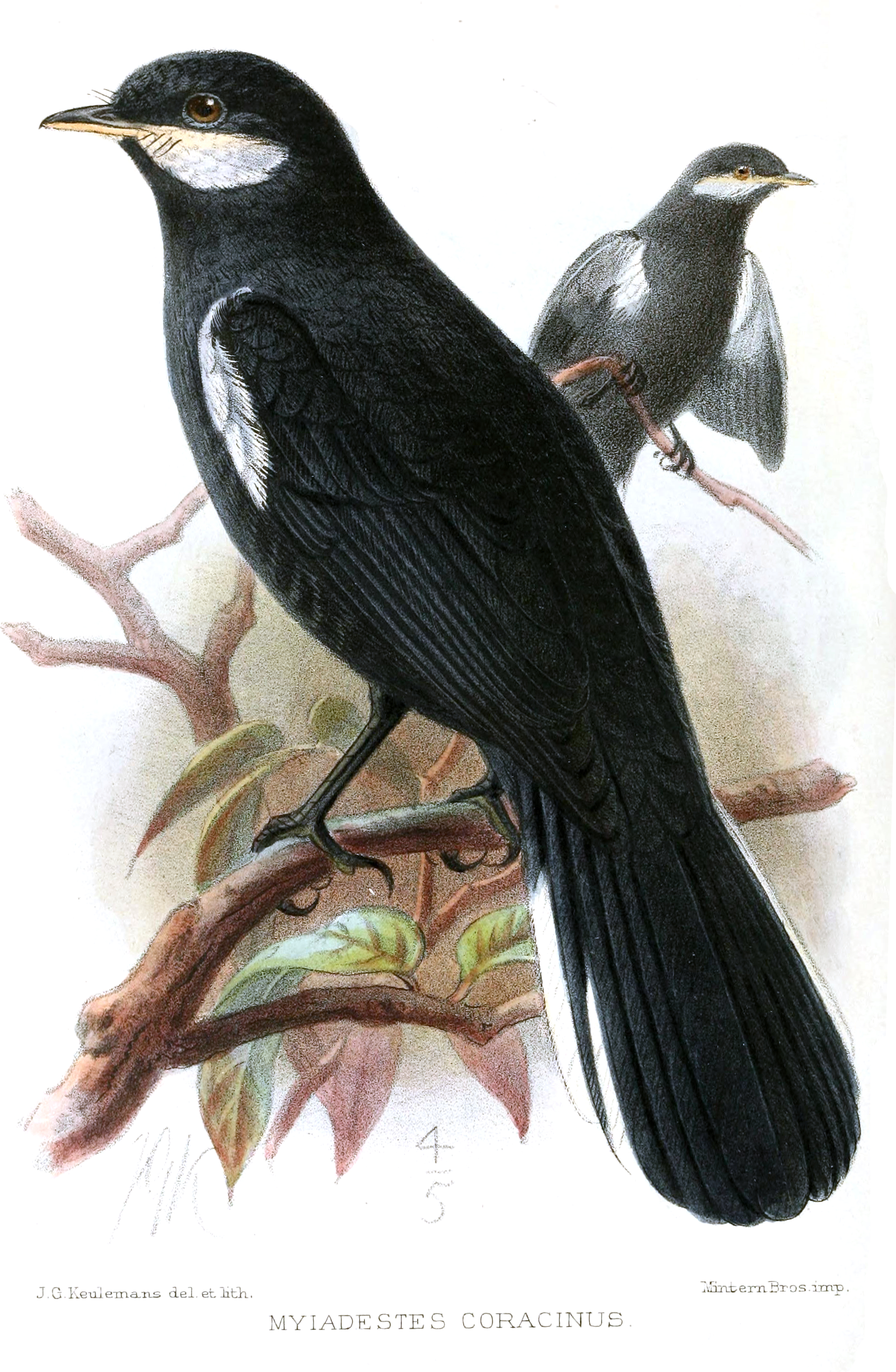 Myiadestes coracinus = Entomodestes coracinus